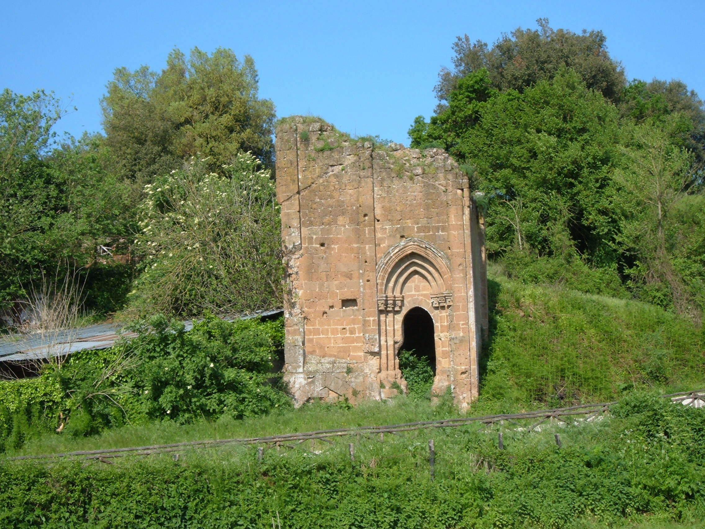 Torre degli Arraggiati, a Sutri.